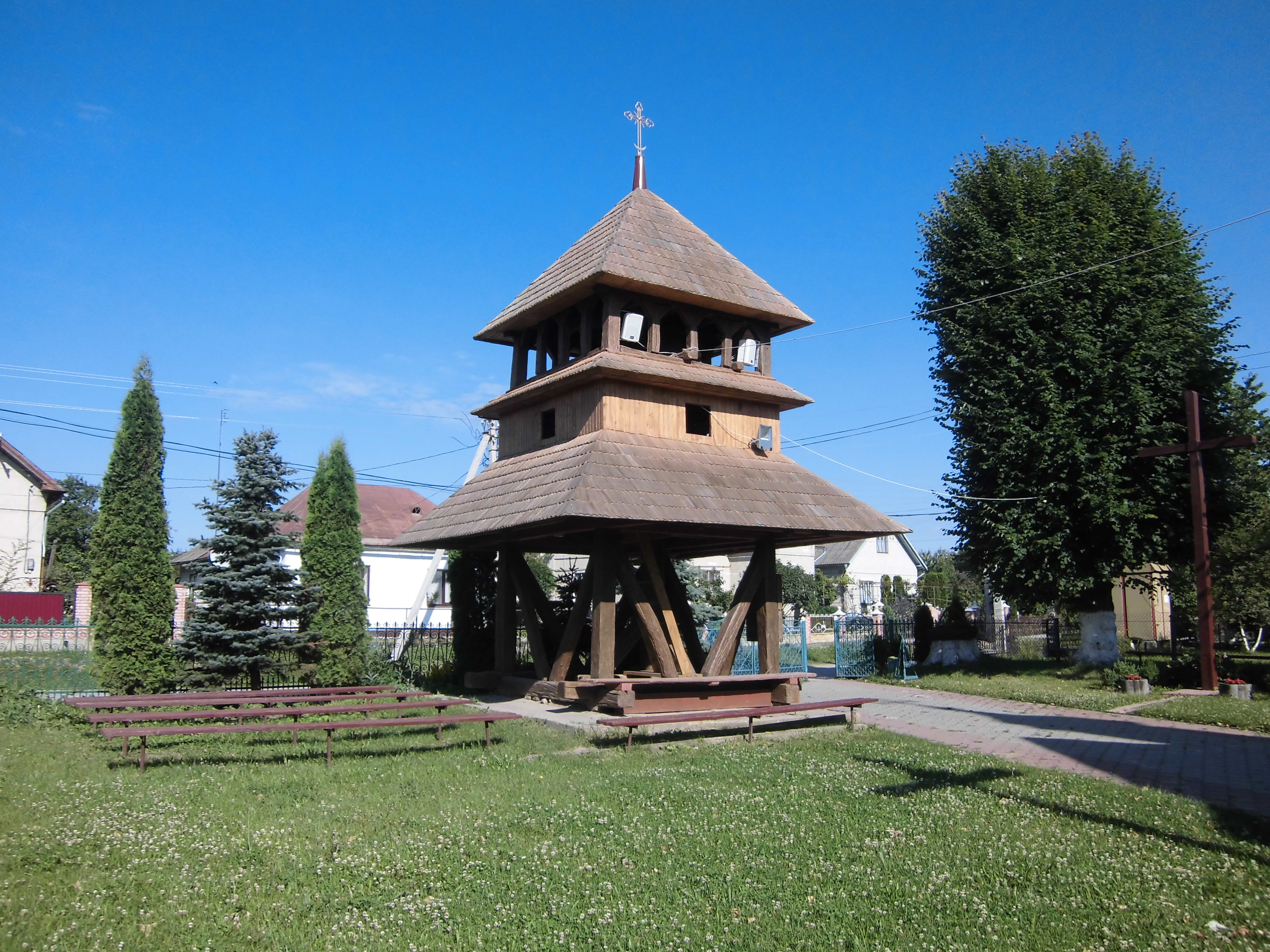 Дзвіниця Церкви Воздвиження Чесного Хреста в м.Копичинці